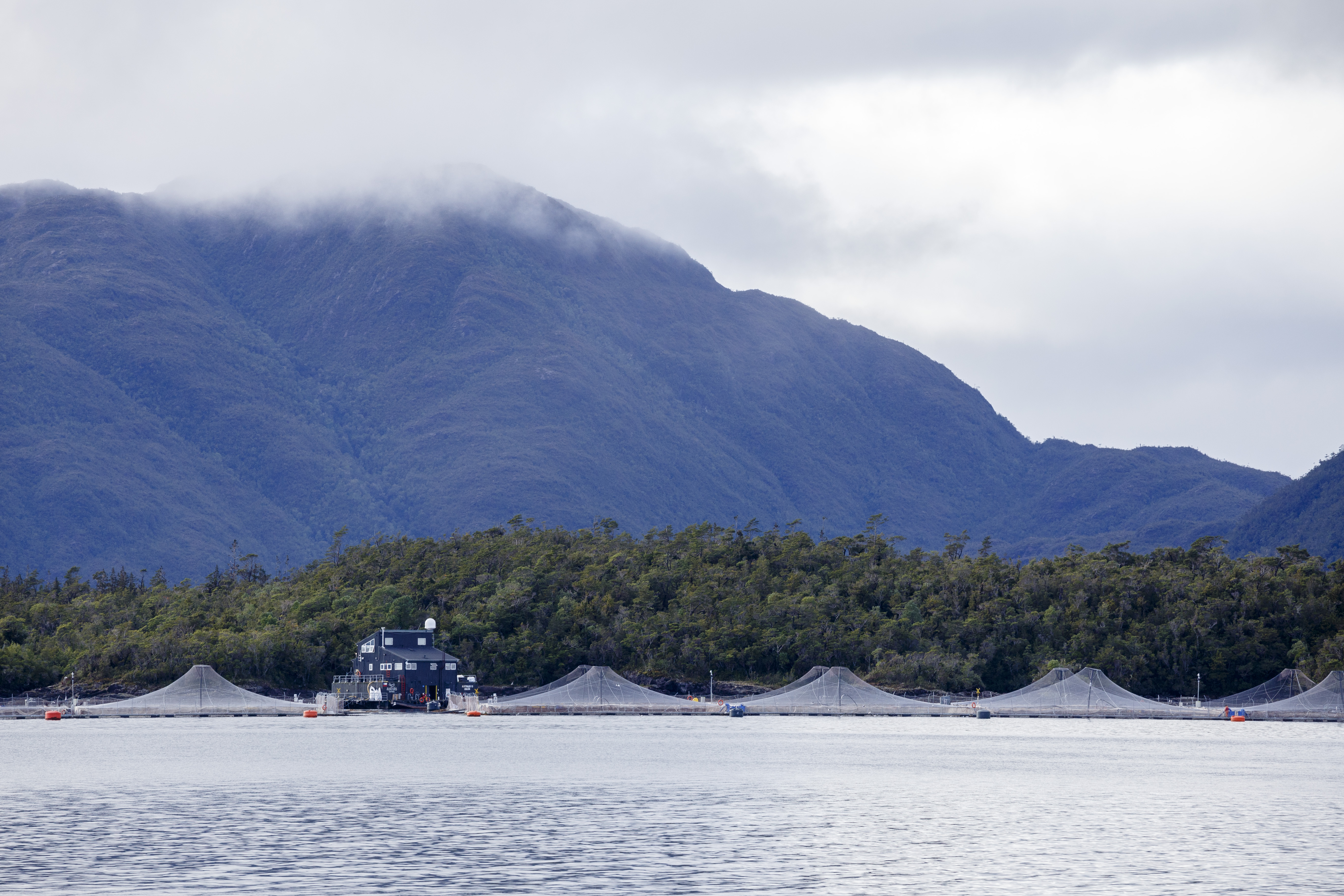 Centro de cultivo de salmón en canal Utarupa, comuna de Aysén, Chile.